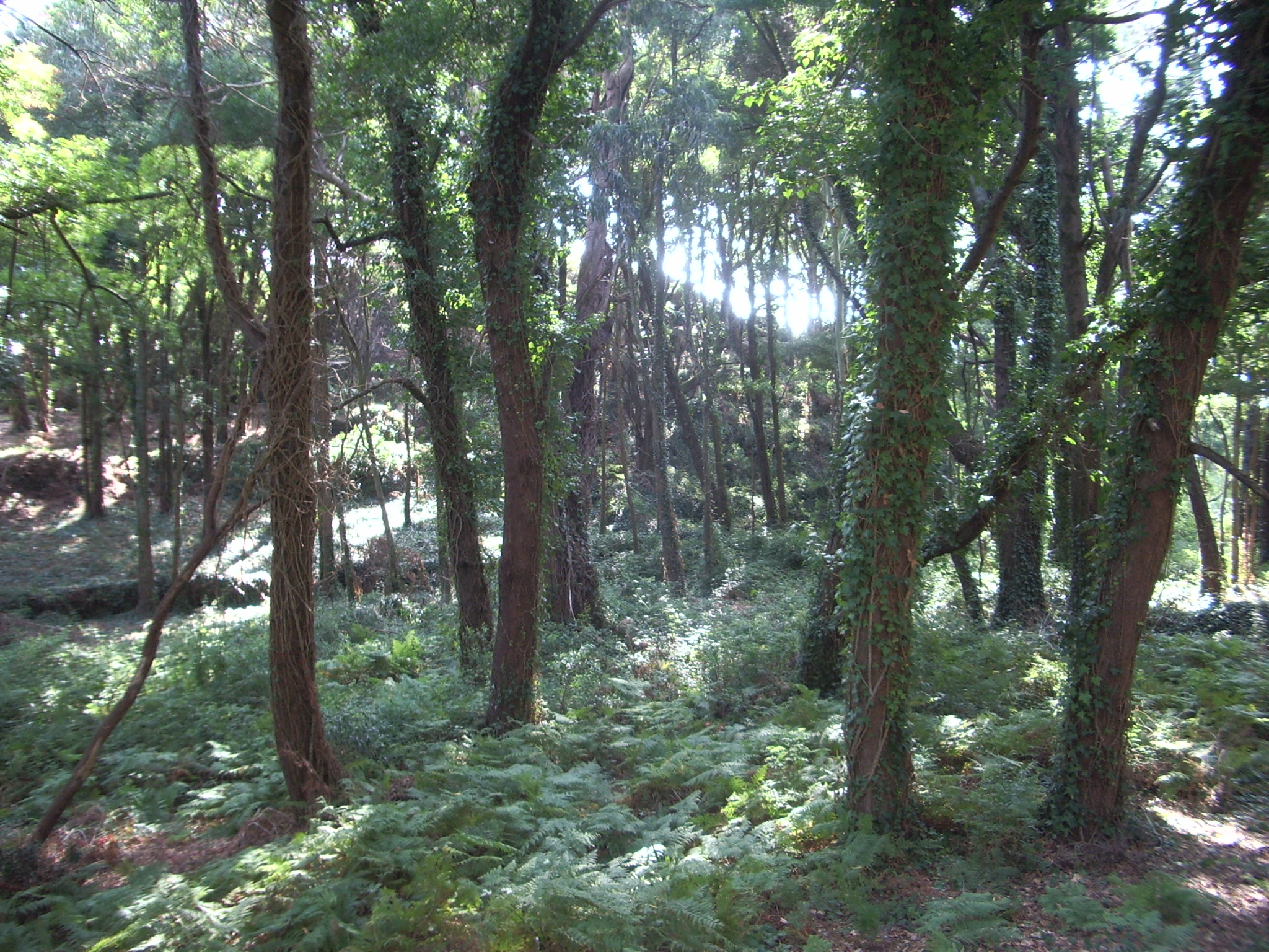 Tipo de vegetación en las Islas Cíes